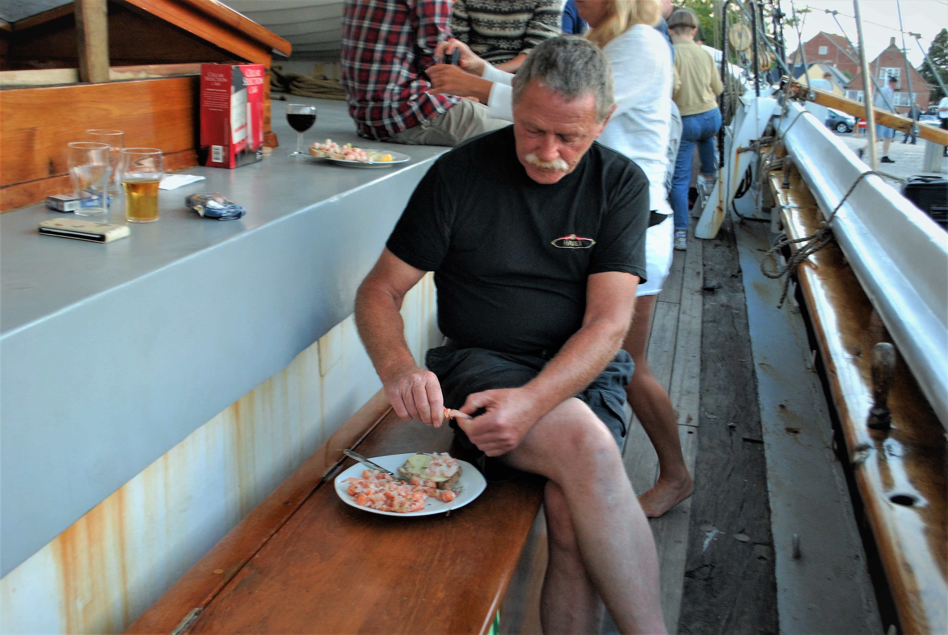 Skipper på galeasen Havet fra 2003 til 2017